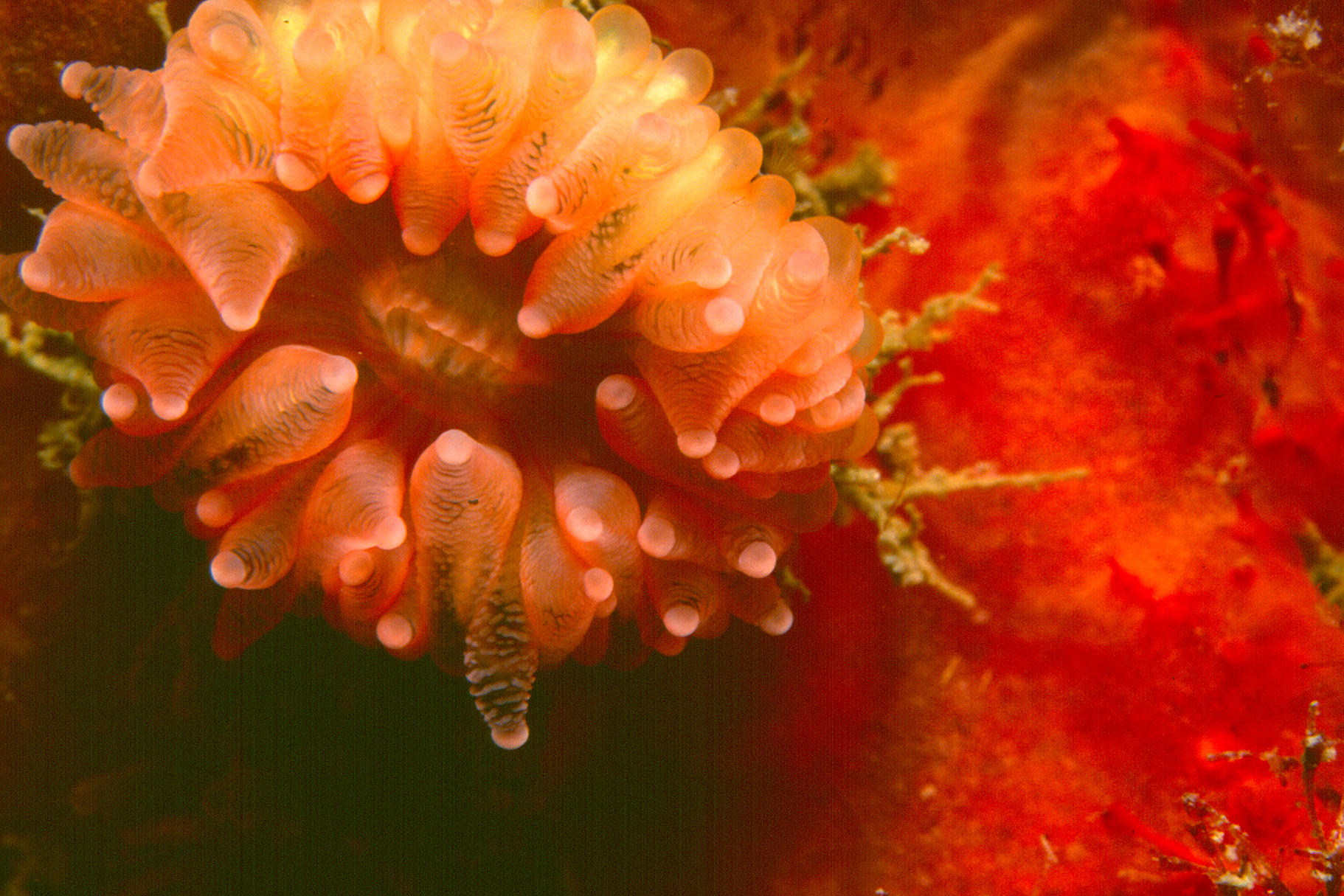 Caryophyllia smithii - Banyuls-sur-Mer : 07/93